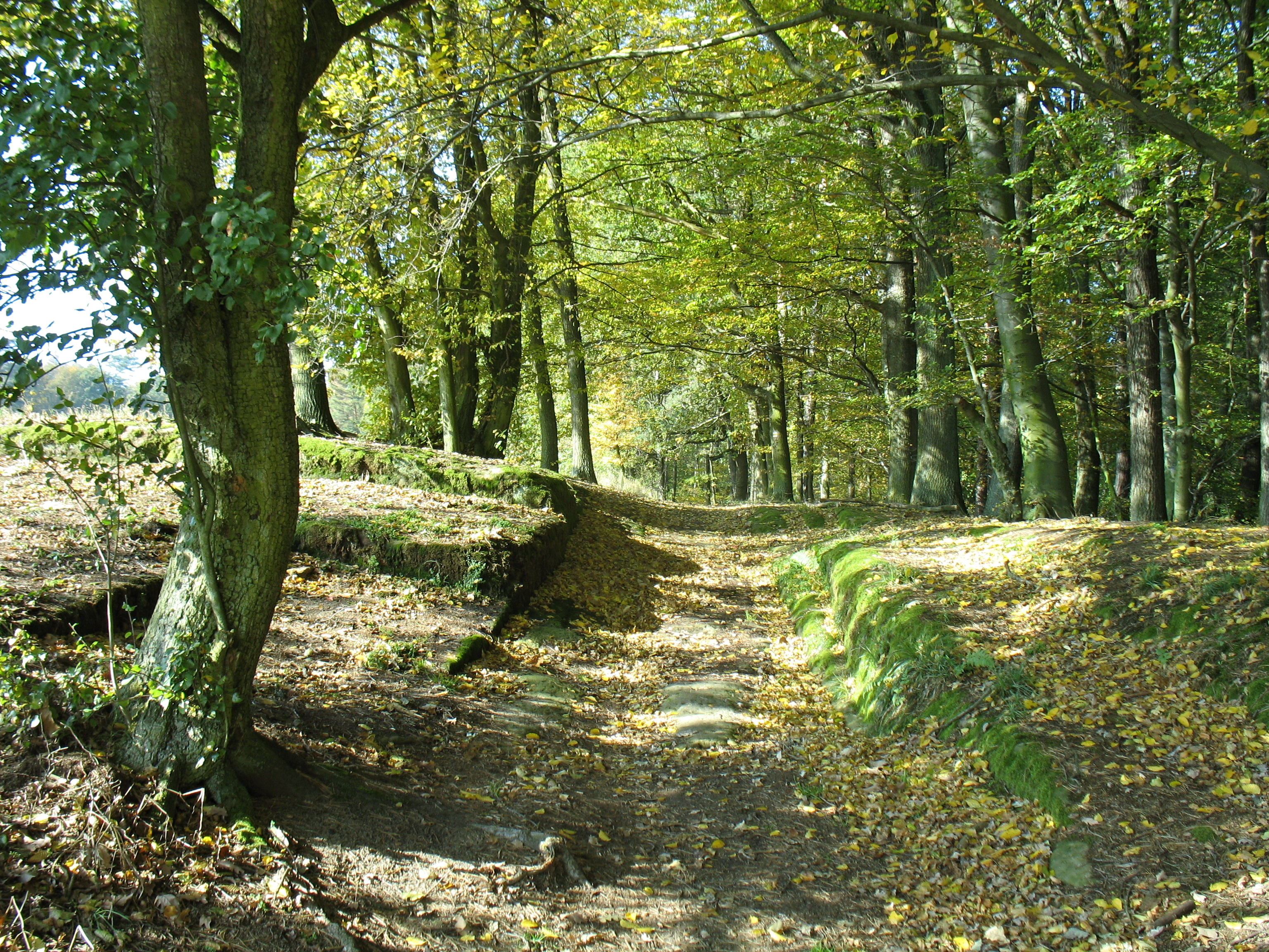 Historická Husí cesta na pomezí okresů Česká Lípa a Litoměřice. V úseku mezi Dřevčicemi a Martinskou stěnou, označovaném jako Stará Husí cesta, byla v roce 2015 vysázena alej ovocných stromů, později oceněná jako Alej roku 2017